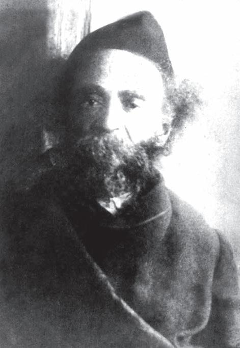 הרוגוצ'ובר בצעירותו